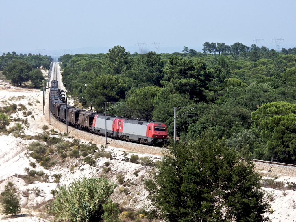 Tipo: Comboio de Transporte de Carvão (material vazio) 66582 [Pego - Sines] Local: Alcácer do Sal [Linha do Sul, PK 86] Data e hora: 28 de Junho de 2008 [16h22] Material: Locomotivas 562x e 562x + 19 vagões CP Uaoos